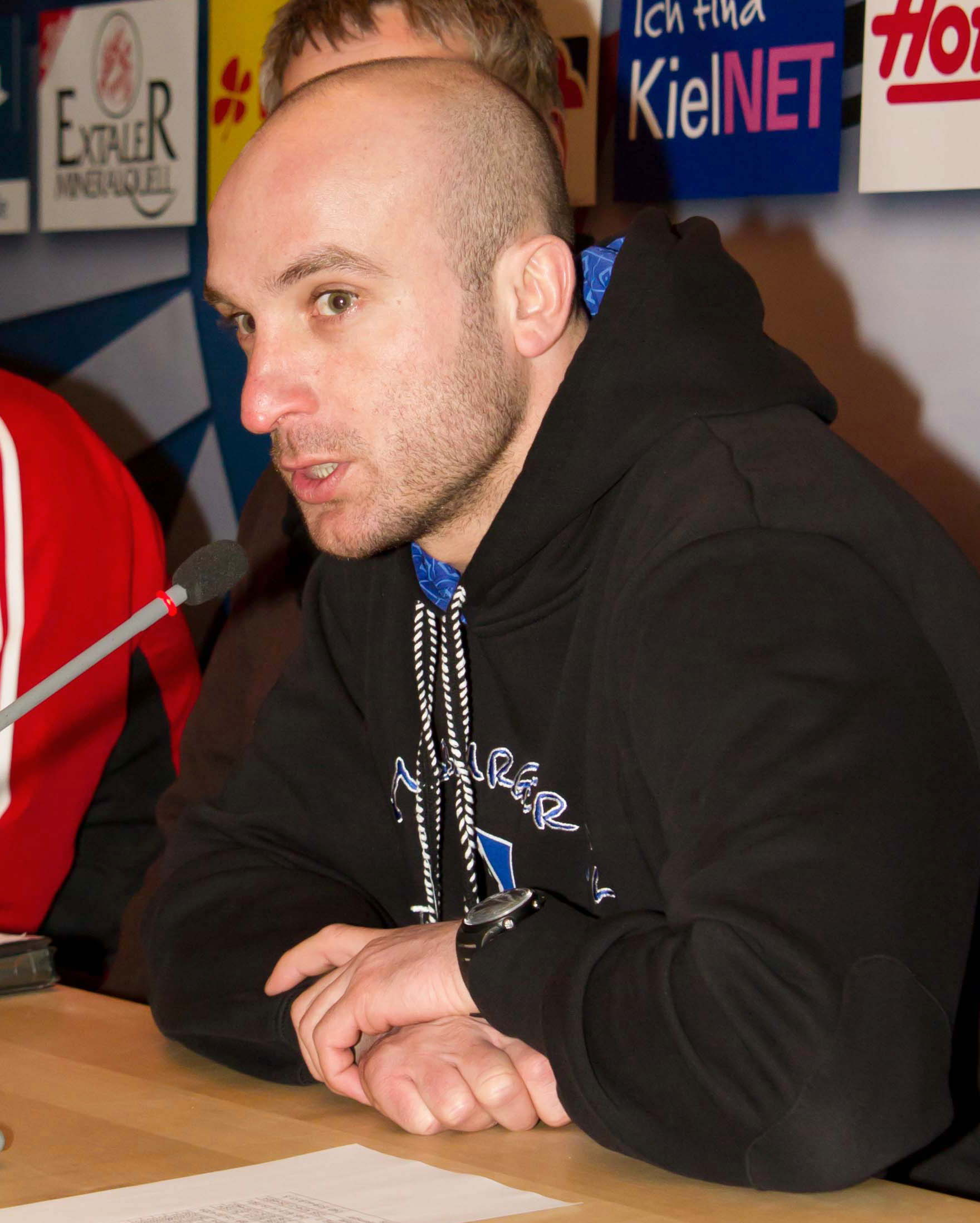 Soner Uysal als Interimstrainer der U-23 des Hamburger SV.